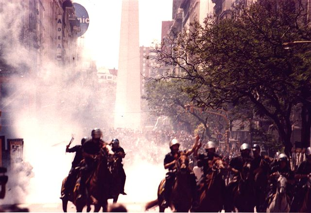 Crisis del 20 de diciembre de 2001 en Argentina